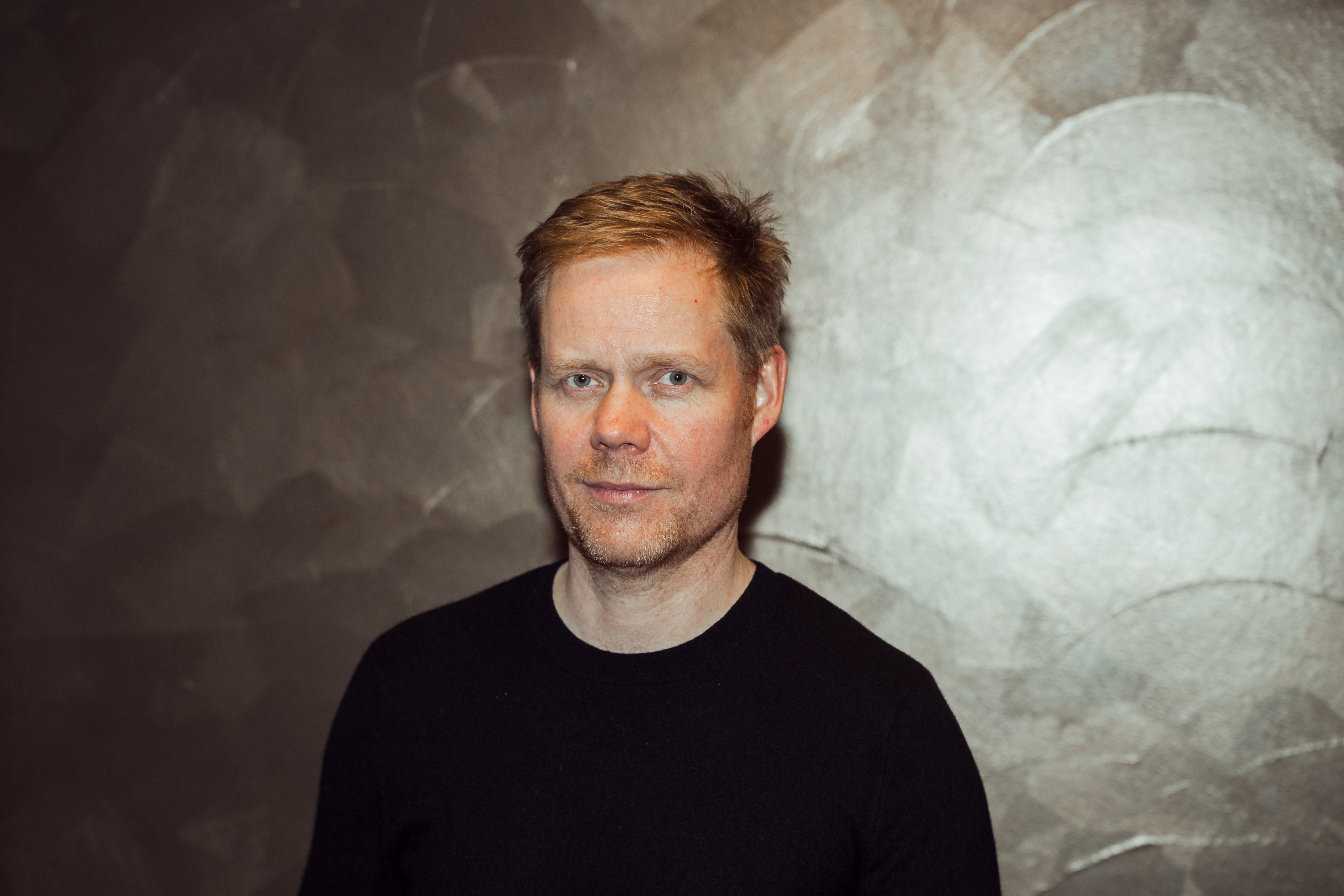 Komponist Max Richter, November 2016 in Leipzig